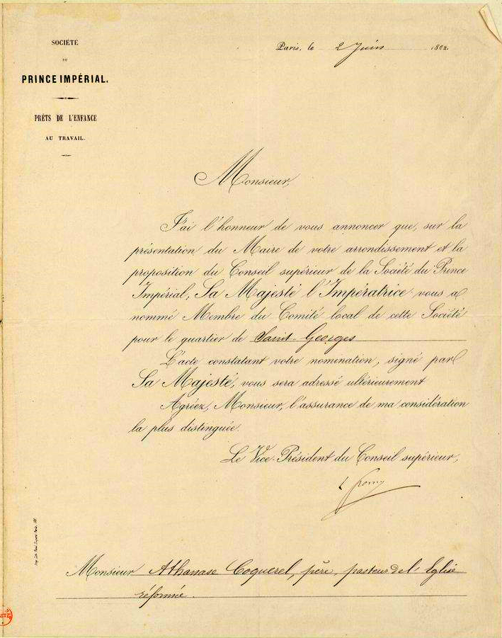 Lettre de Louis Frémy, vice-président de la Société du Prince Impérial au pasteur Athanase Coquerel pour lui notifier sa nomination par l'impératrice Eugénie comme Membre du Comité local de la dite Société. A Paris, le 2 juin 1862. Imprimerie Lithographie Paul Dupont, Paris 778